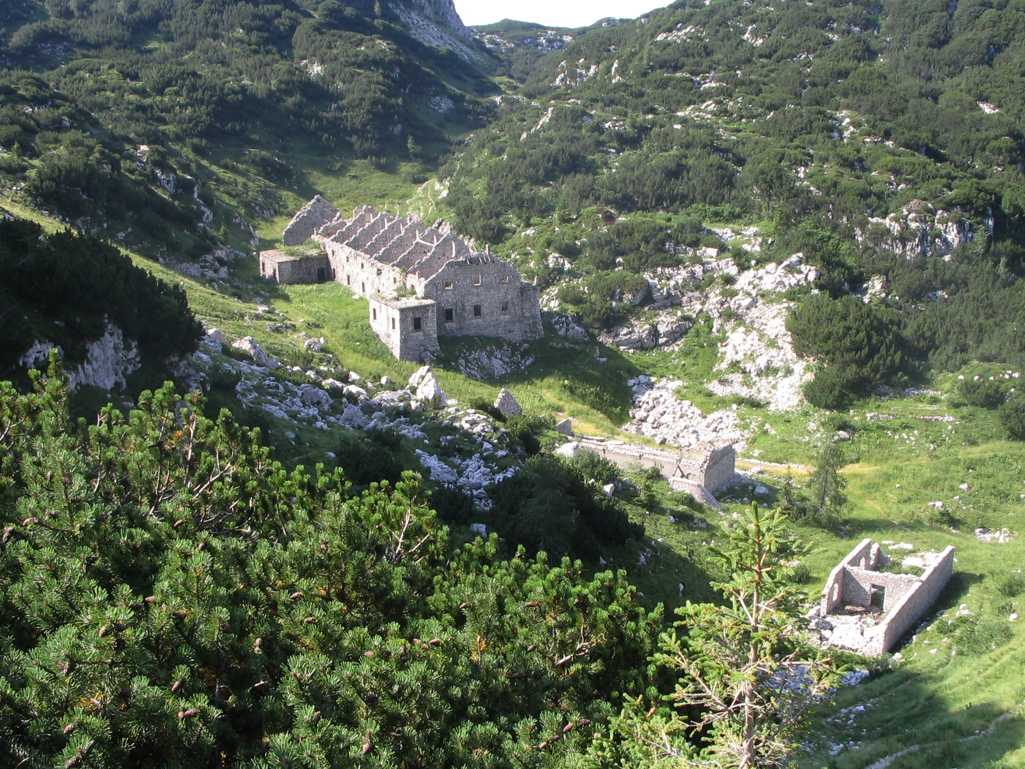 Ostanki vojašnice Za Lepočami